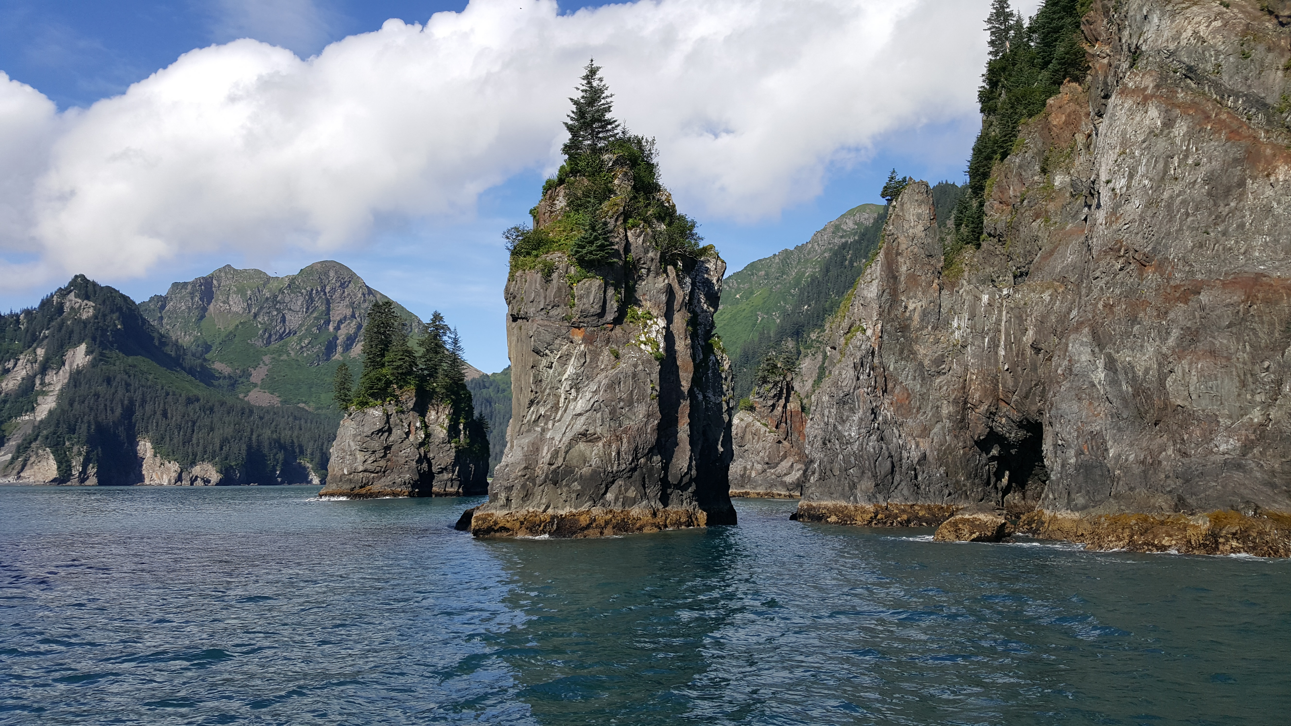 Kenai Fjords National Park